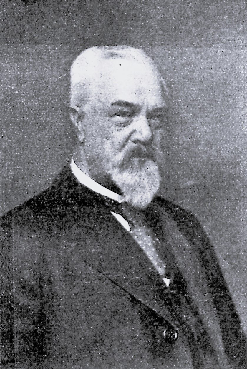 Heinrich Thiel, Vorstand des Stanz- und Emaillierwerkes Carl Thiel & Söhne.